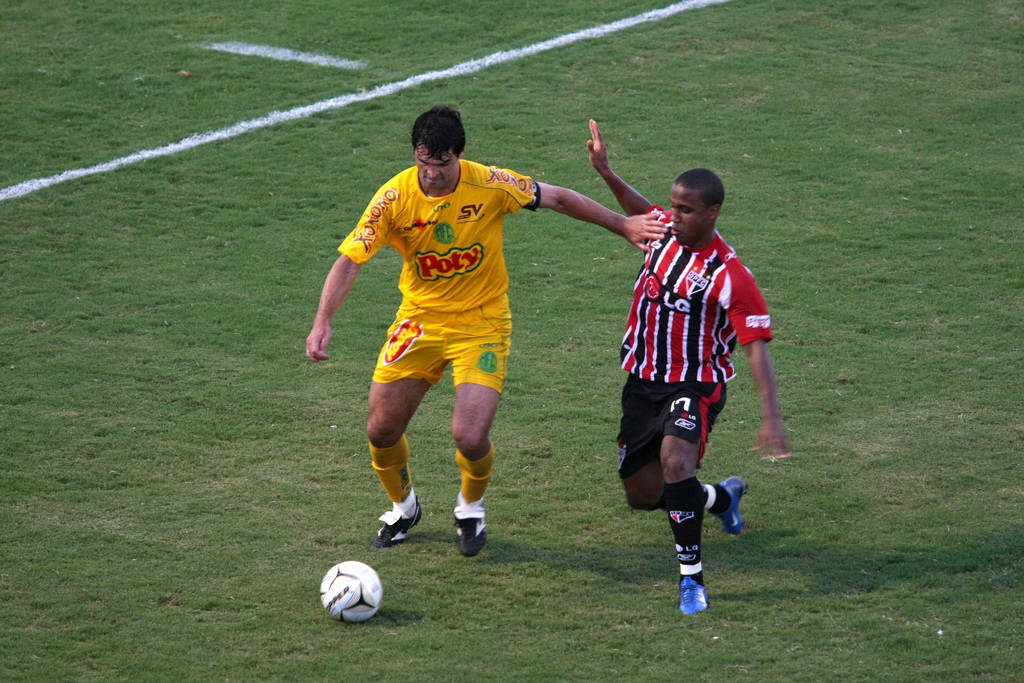 Atacante Borges do São Paulo em lance com André Turatto do Mirassol.